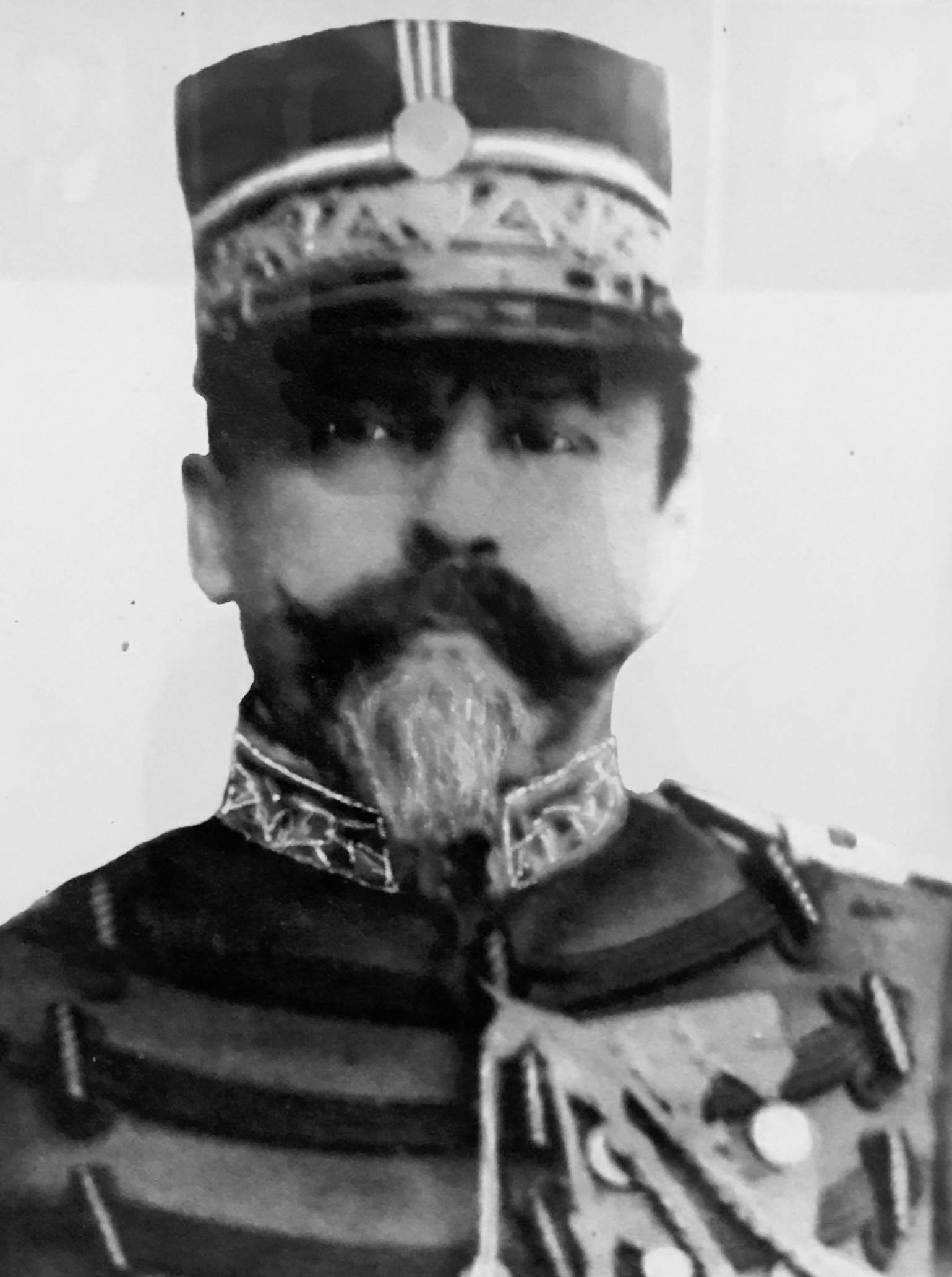 Fotografía del militar tomada en 1898 aprox.